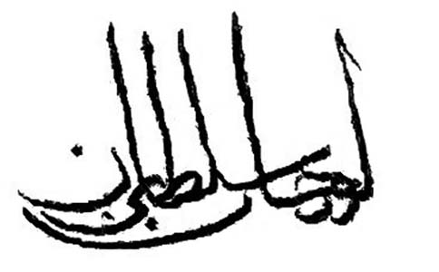 "Orhân bin Sultân", Çalıca Mülk-nâmesi, Ramazân 700-Mayıs 1301